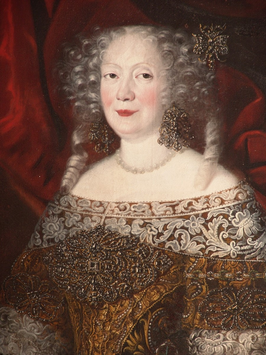 Ludmila Eva Františka Krakowská z Kolowrat, rozená Hiserlová z Chodova (manželka Viléma Albrechta Krakowského z Kolowrat)